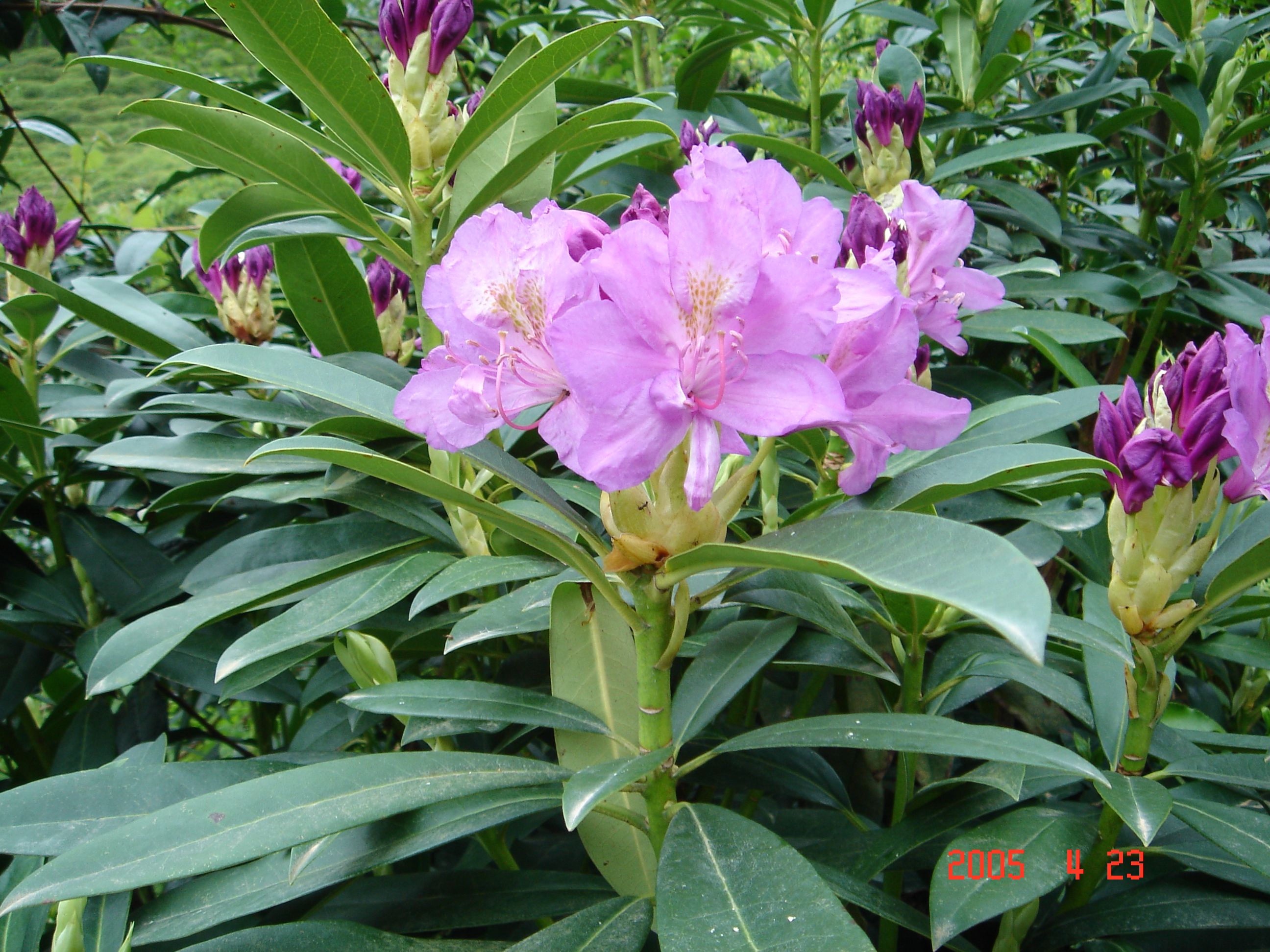 Rhododendron pontica